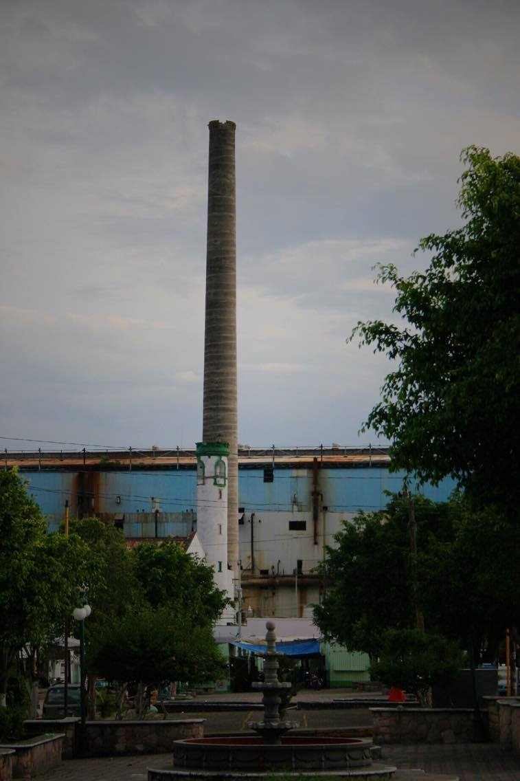 Vista desde el centro de Atencingo